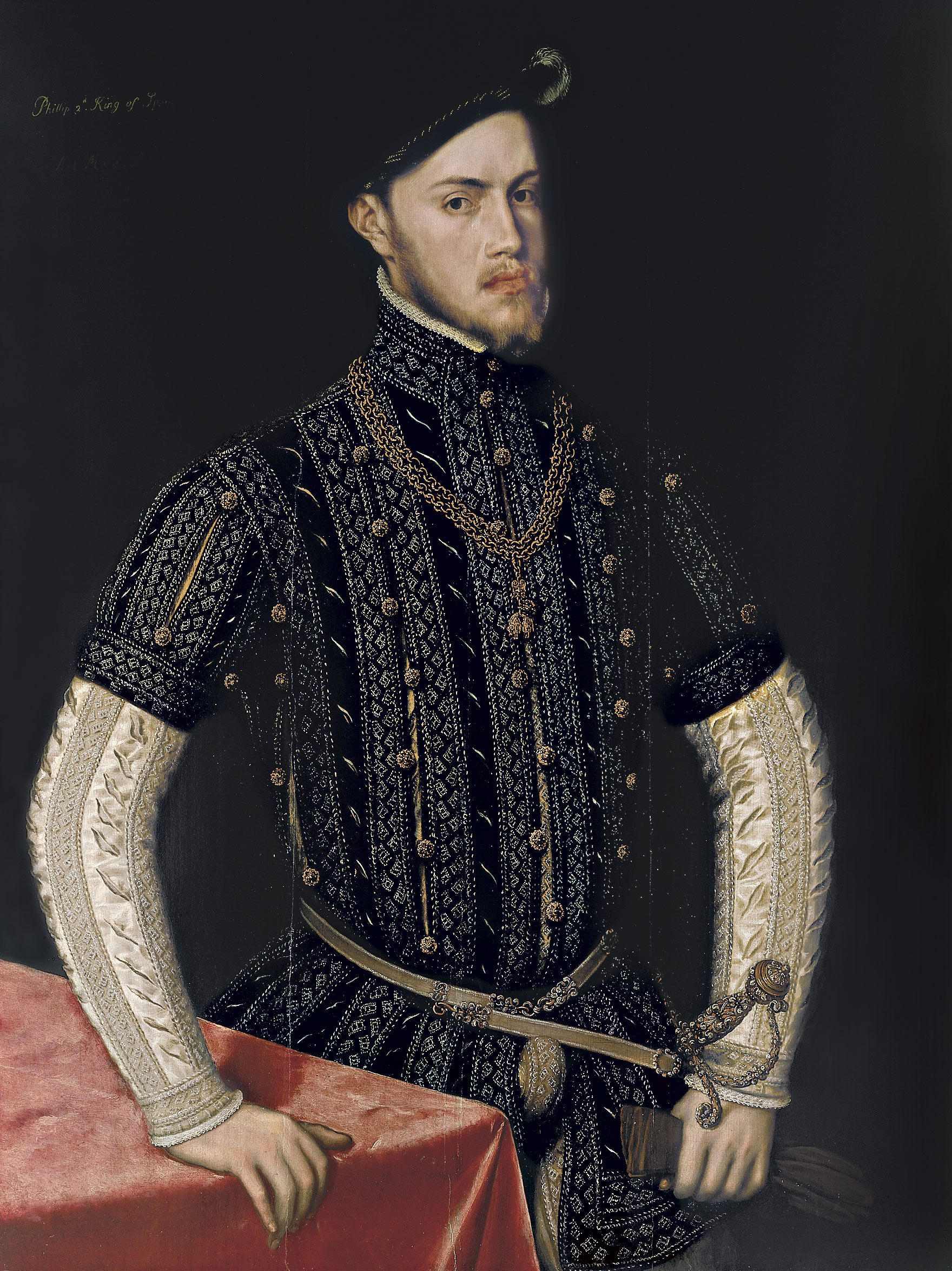 Retrato del rey Felipe II de España (1527-1598), que fue hijo del emperador Carlos I de España y de la reina Isabel de Portugal.